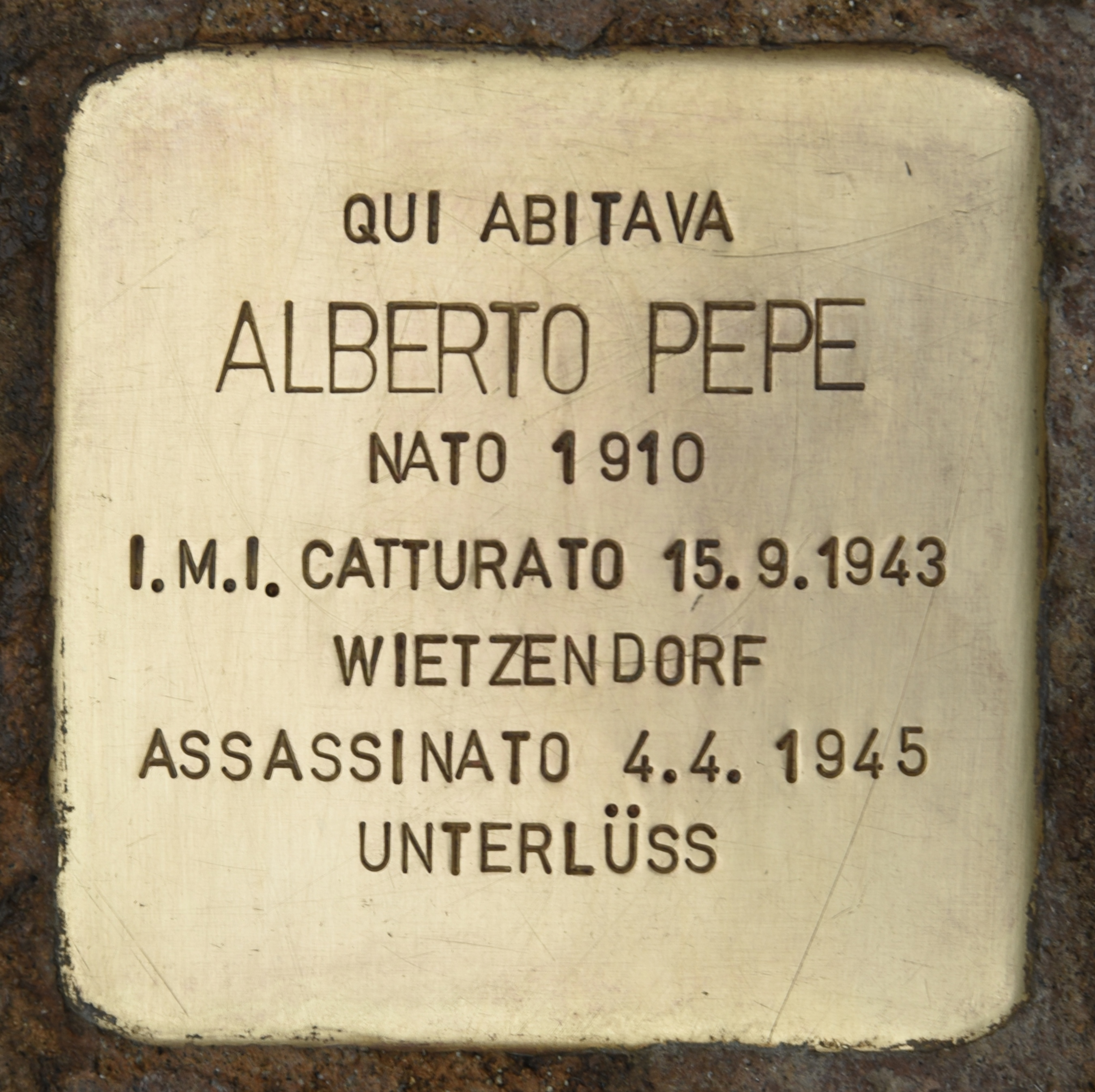 Stolperstein für Alberto Pepe